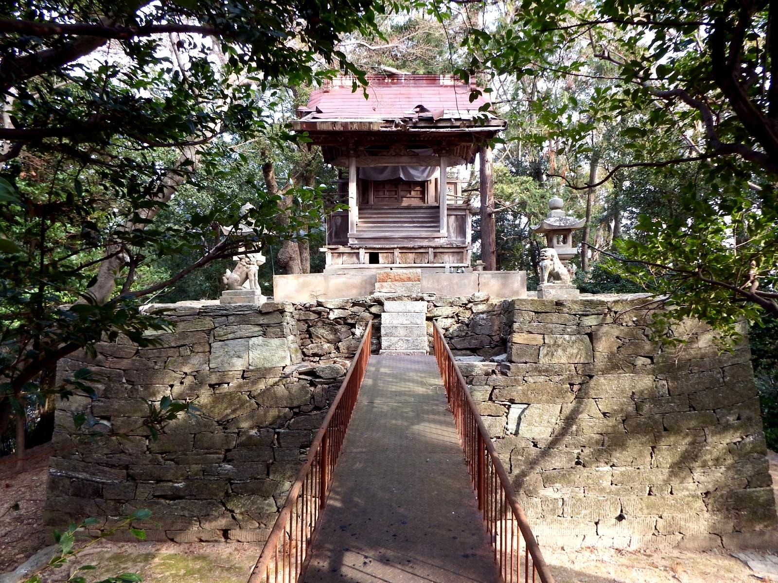 丈六寺の秋葉神社